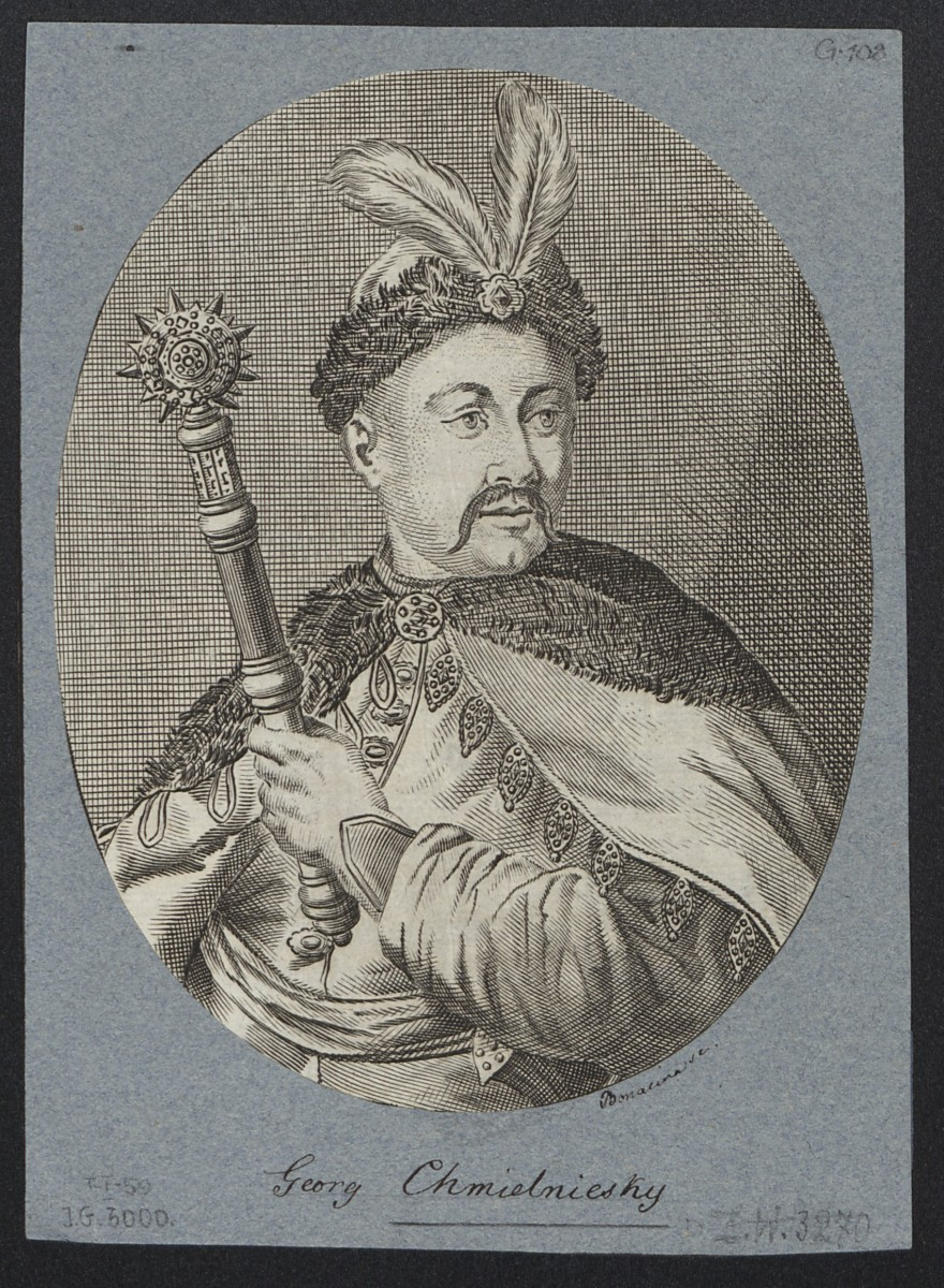 Юрій (Георг) Хмельницький. Giorgio Chimilinschi[!] Generale de Cosacchi.